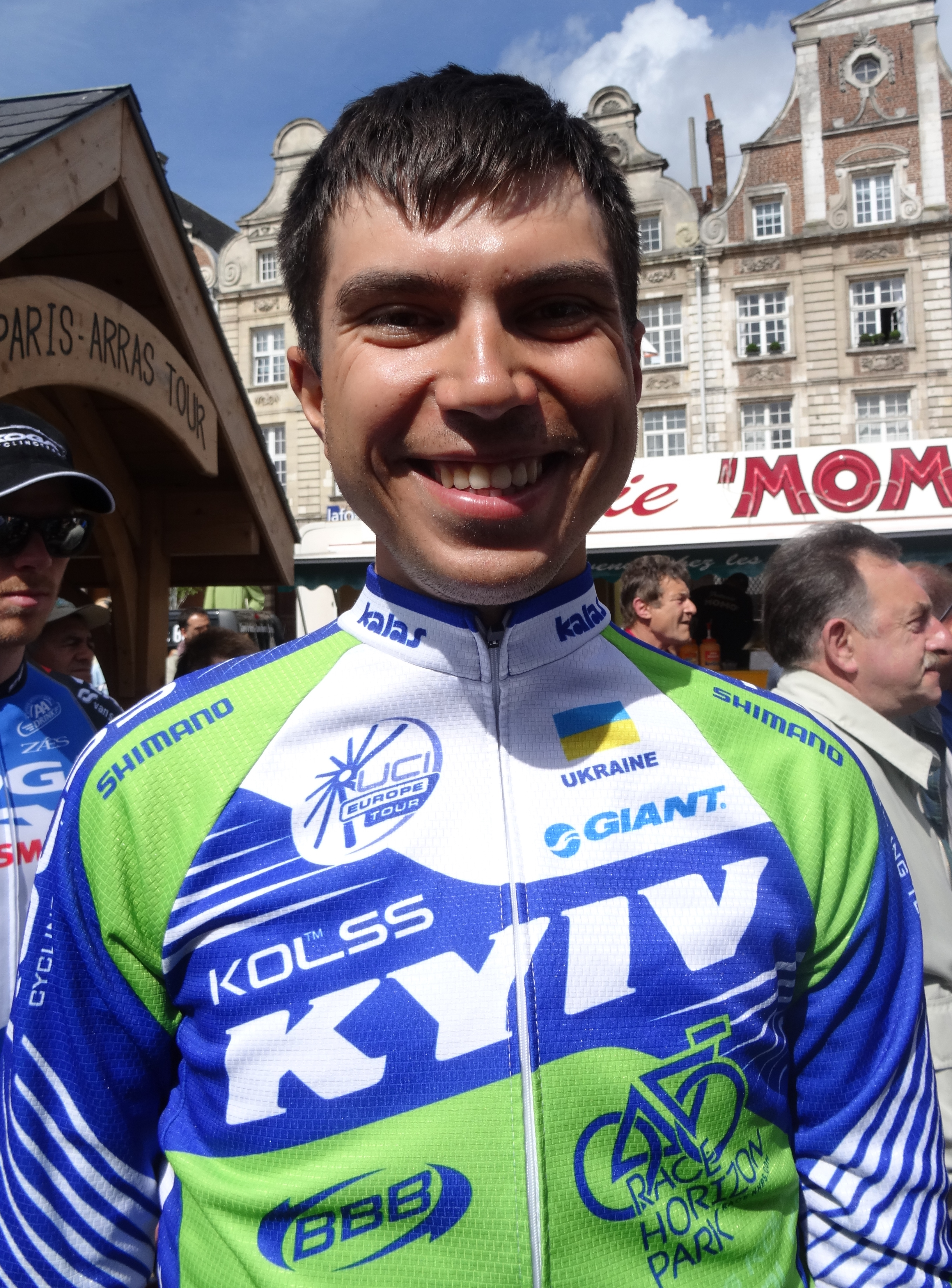 Reportage photographique réalisé le dimanche 25 mai 2014 à l'occasion du départ et de l'arrivée de la troisième étape du Paris-Arras Tour 2014 à Arras, Pas-de-Calais, Nord-Pas-de-Calais, France. Depicted person: Oleksandr Polivoda